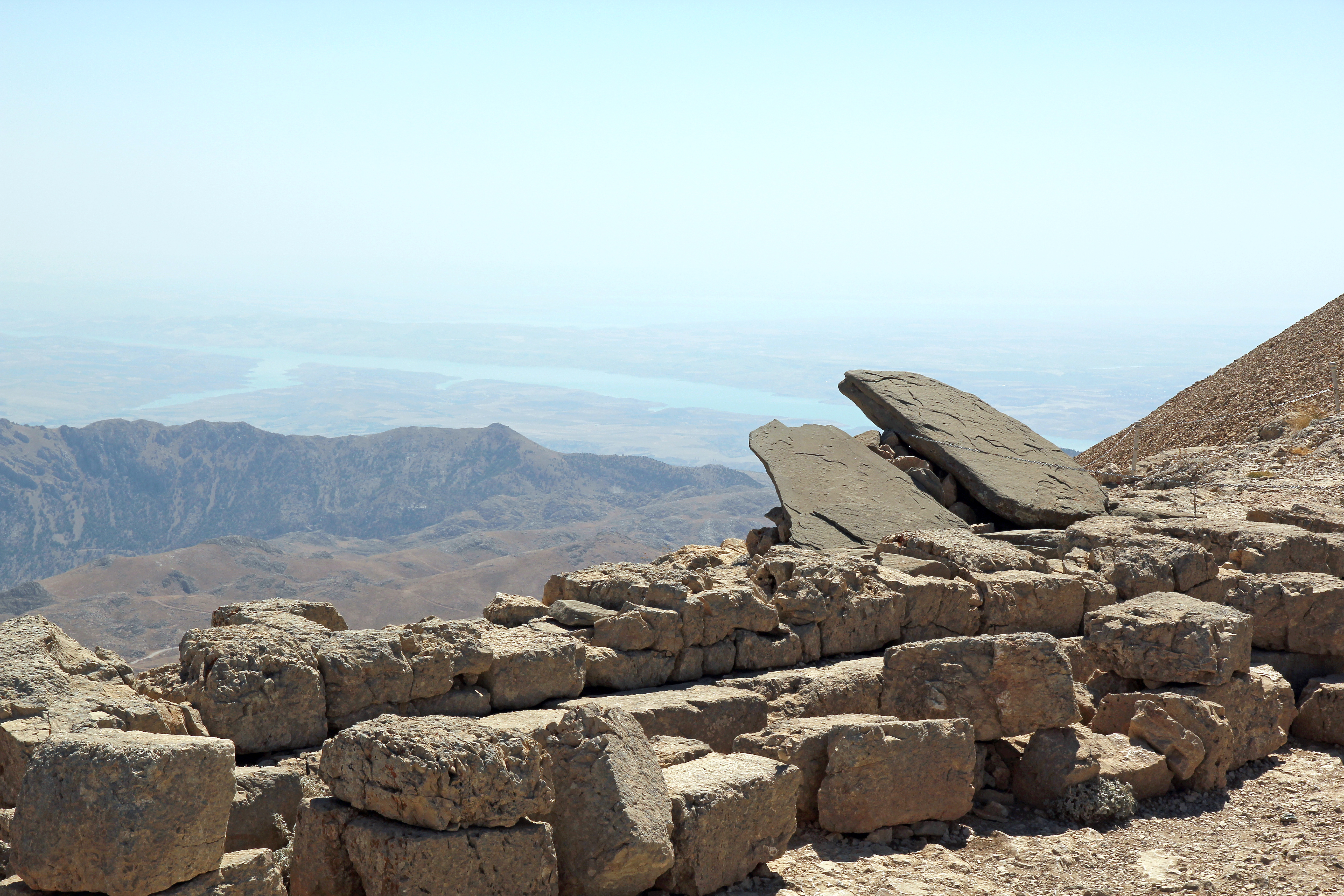 Südsockel der griechischen Ahnen, Nemrut Dağı, Südosttürkei, Ostterrasse